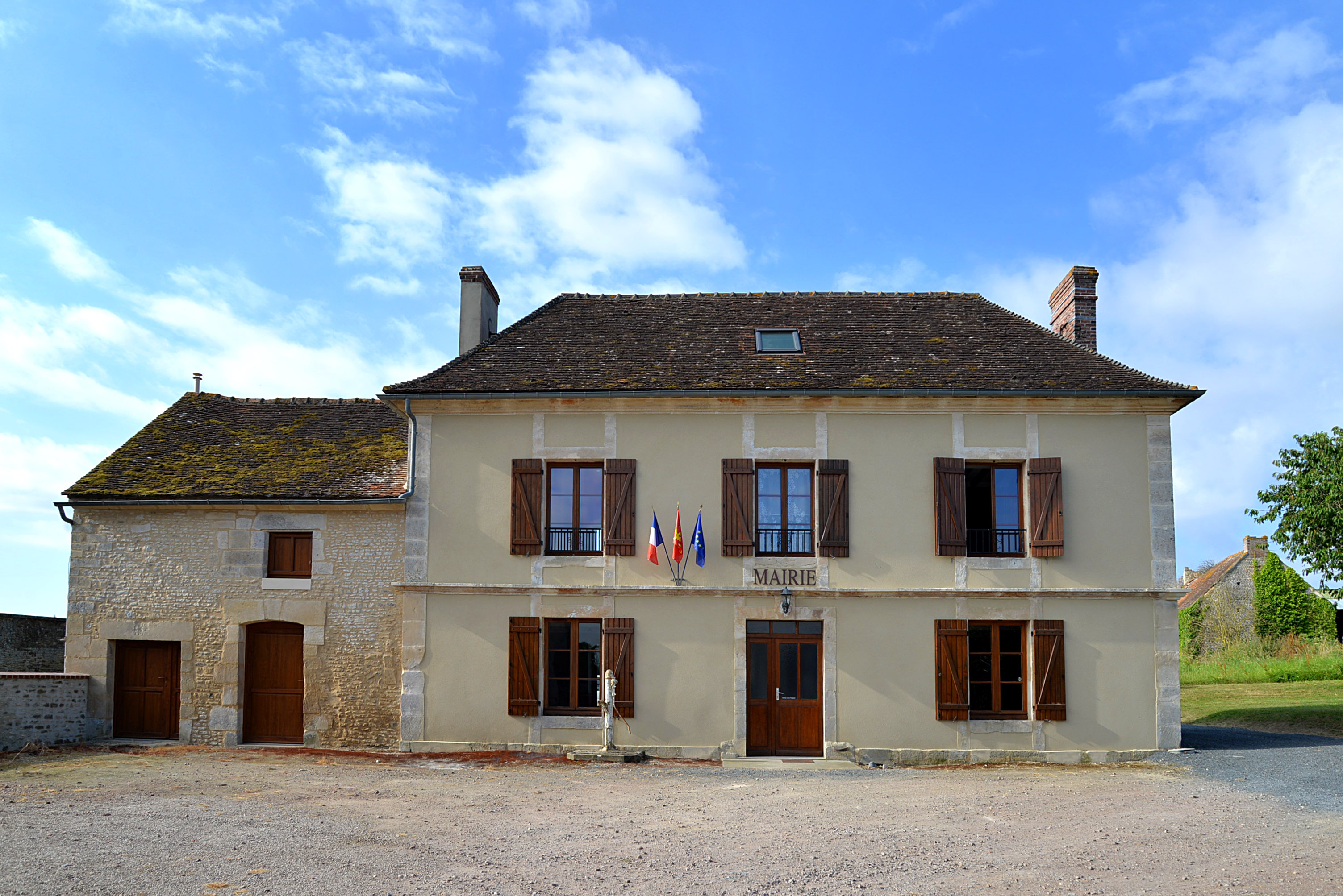 Ommoy (Orne)